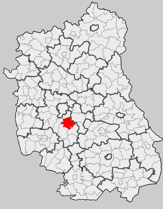 Map of gmina Jabłonna, Lublin county, Lublin voivodship Mapa gminy Jabłonna, powiat lubelski, województwo lubelskie